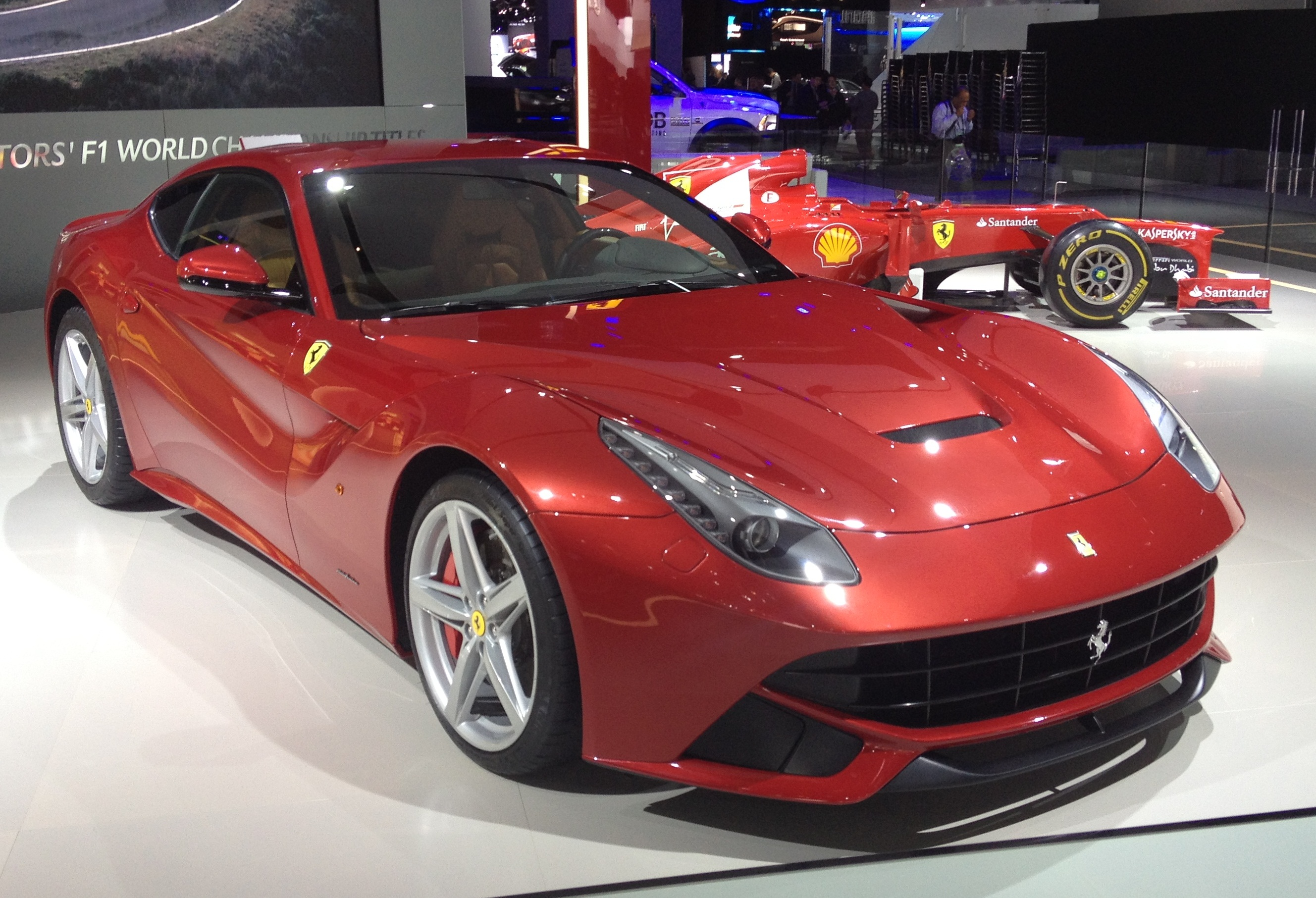 Ferrari F12berinetta premiata con il XXIII Premio Compasso d'oro ADI